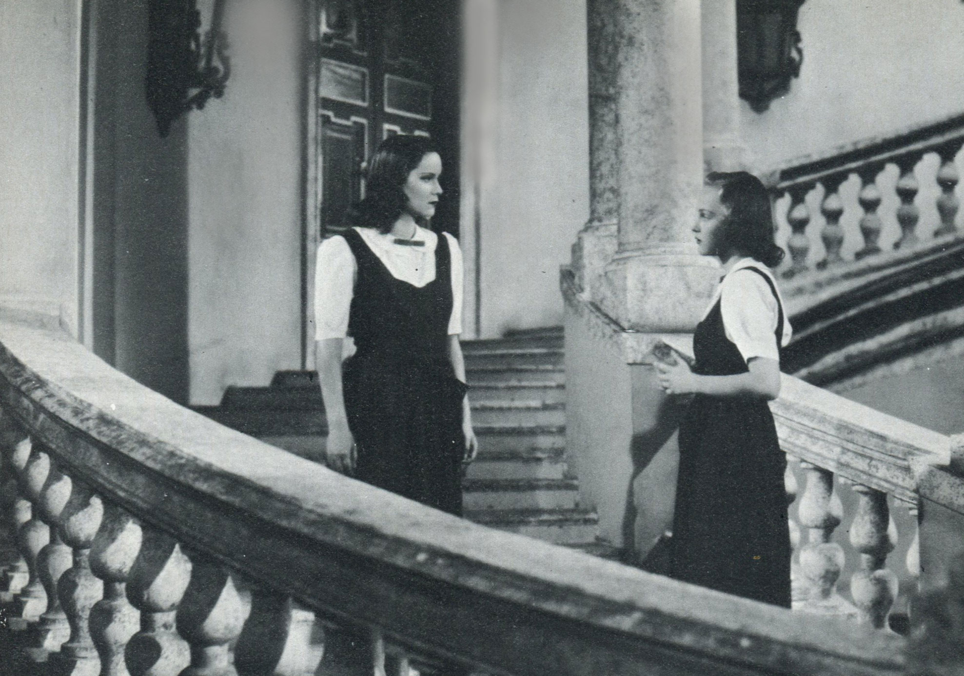 Alida Valli e Irasema Dilian in "ore 9 lezione di chimica" (mattoli, 1941)